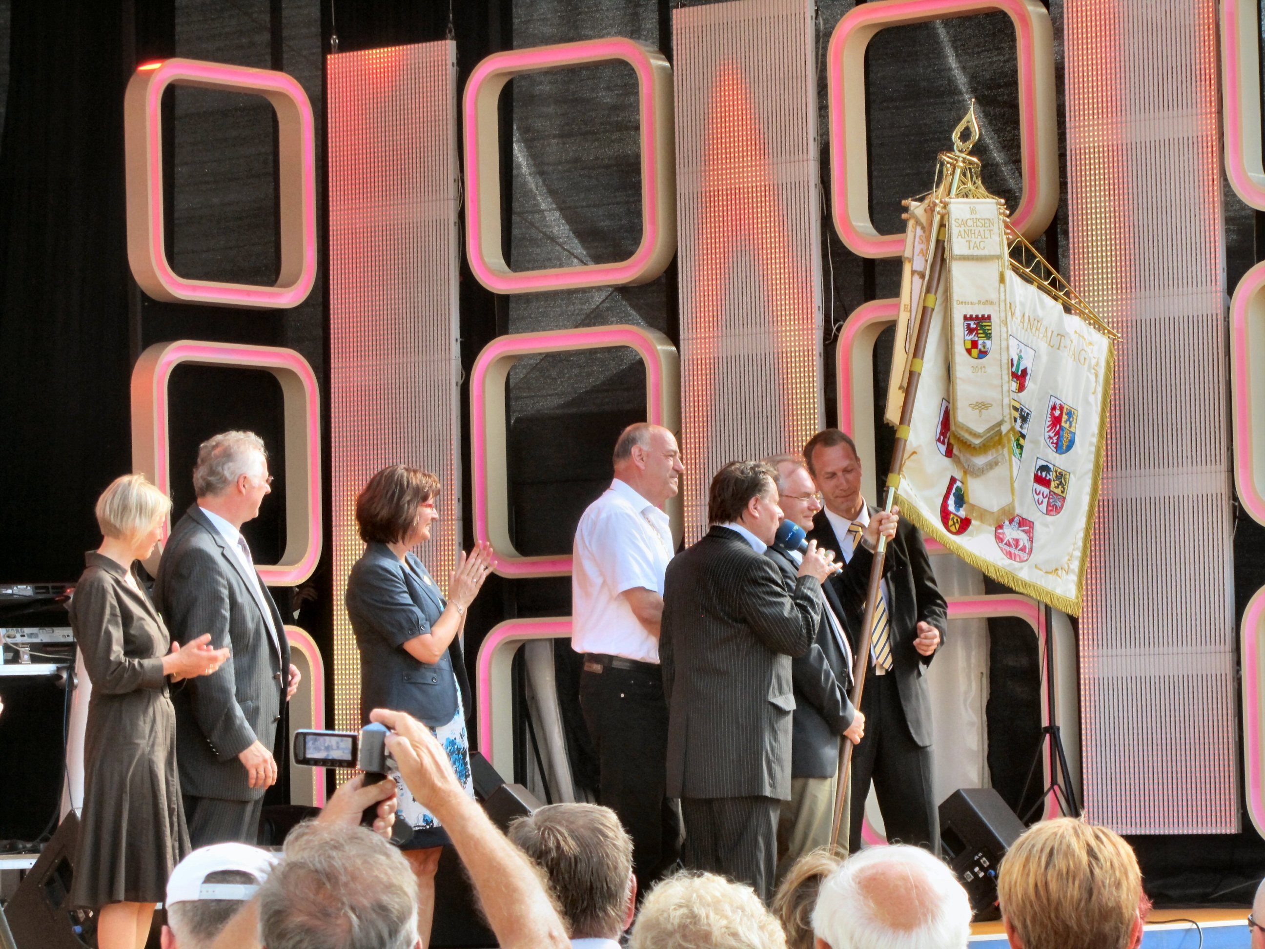 Übergabe der Sachsen-Anhalt-Tag-Fahne in Dessau-Roßlau an den Bürgermeister von Gommern. v.l.n.r.: Klemens Koschig (Oberbürgermeister von Dessau-Roßlau), Wolfgang Rauls (2005-2012 Bürgermeister von Gommern), Lutz Mücke (MDR Moderator), Reiner Haseloff (Ministerpräsident des Landes Sachsen-Anhalt), Jens Hünerbein (Bürgermeister von Gommern)